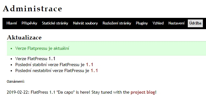 český překlad flatpress.cz